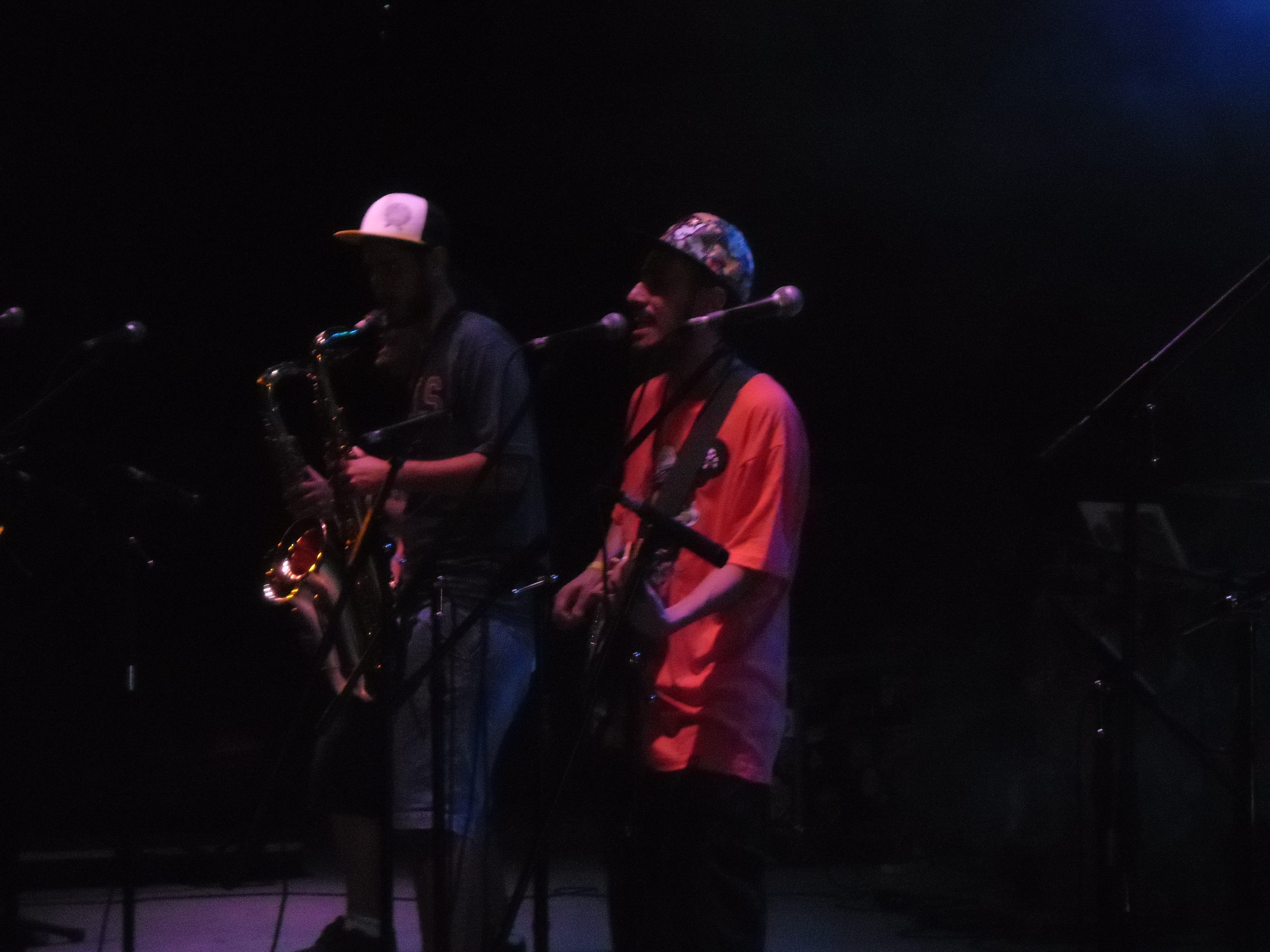 El grupo de rock fusión argentino, Oye Primate en vivo.